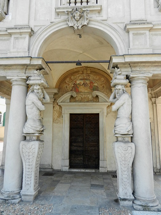 Varese - Ingresso del Santuario della Madonnina in Prato